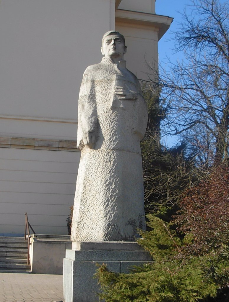 Galeria pomników kompozytorów i wirtuozów muzyki poważnej w Bydgoszczy - pomnik Karola Szymanowskiego